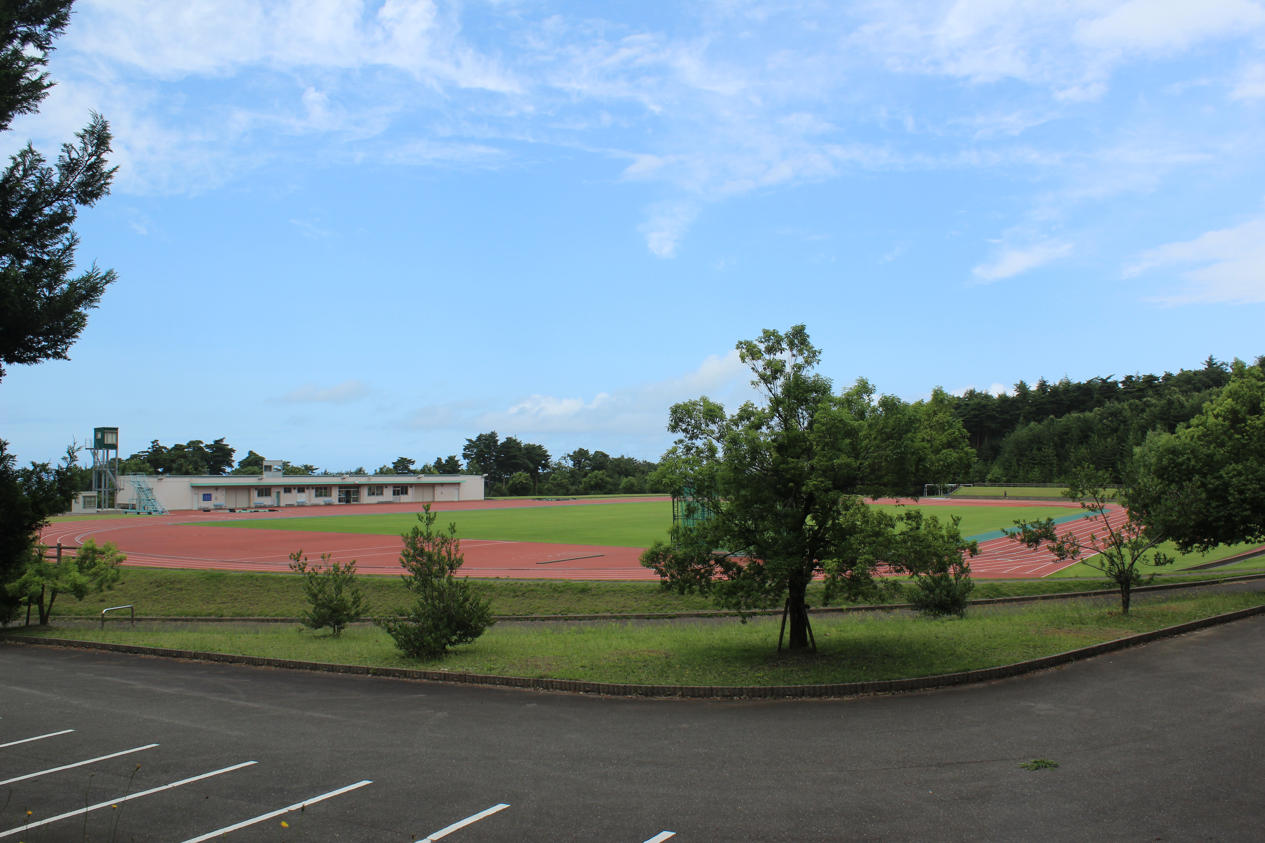 美山陸上競技場。糸魚川市営。新潟県糸魚川市大野65-1。